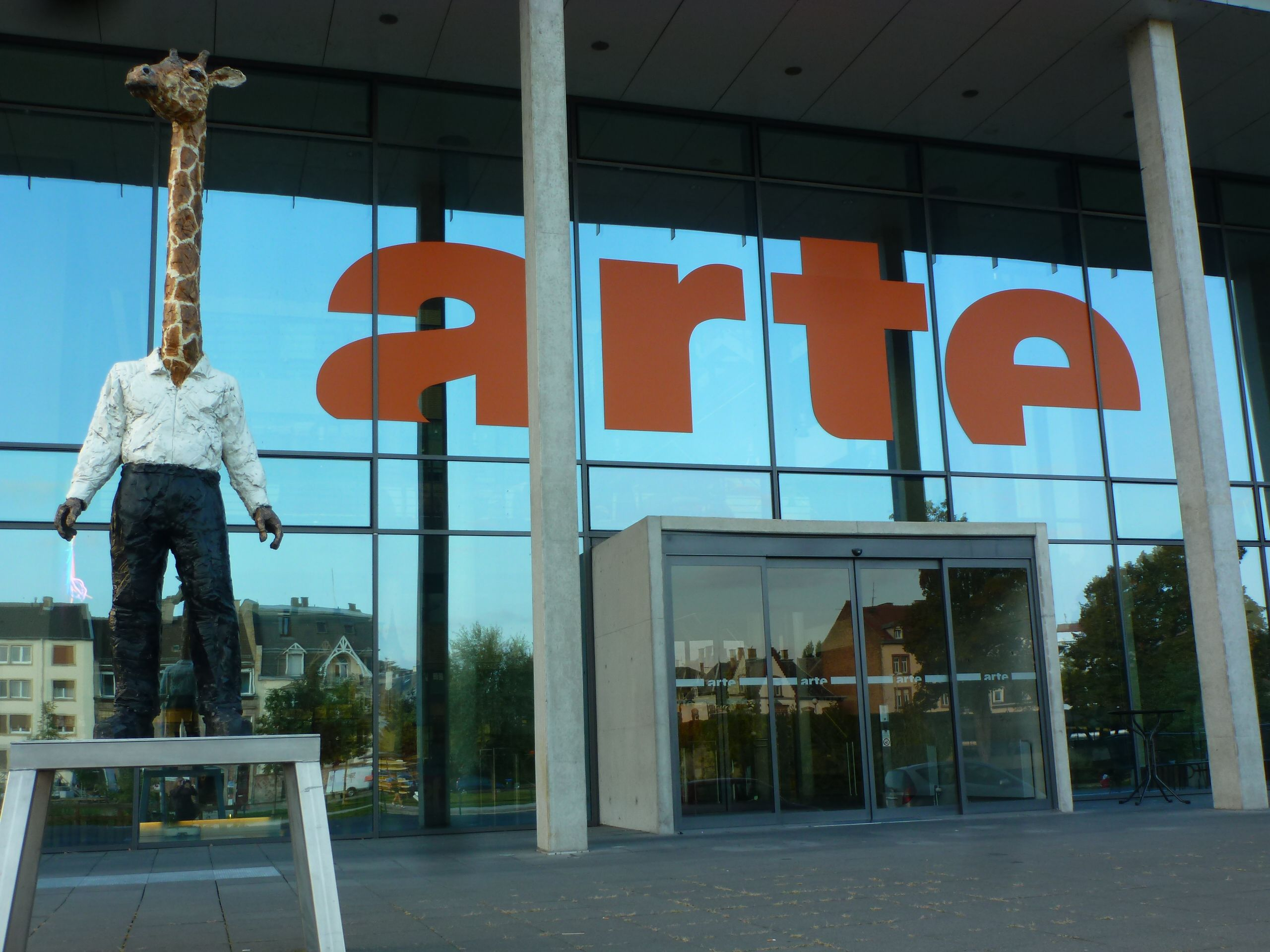 Eingang von arte mit dem homme-Girafe / Giraffenmann